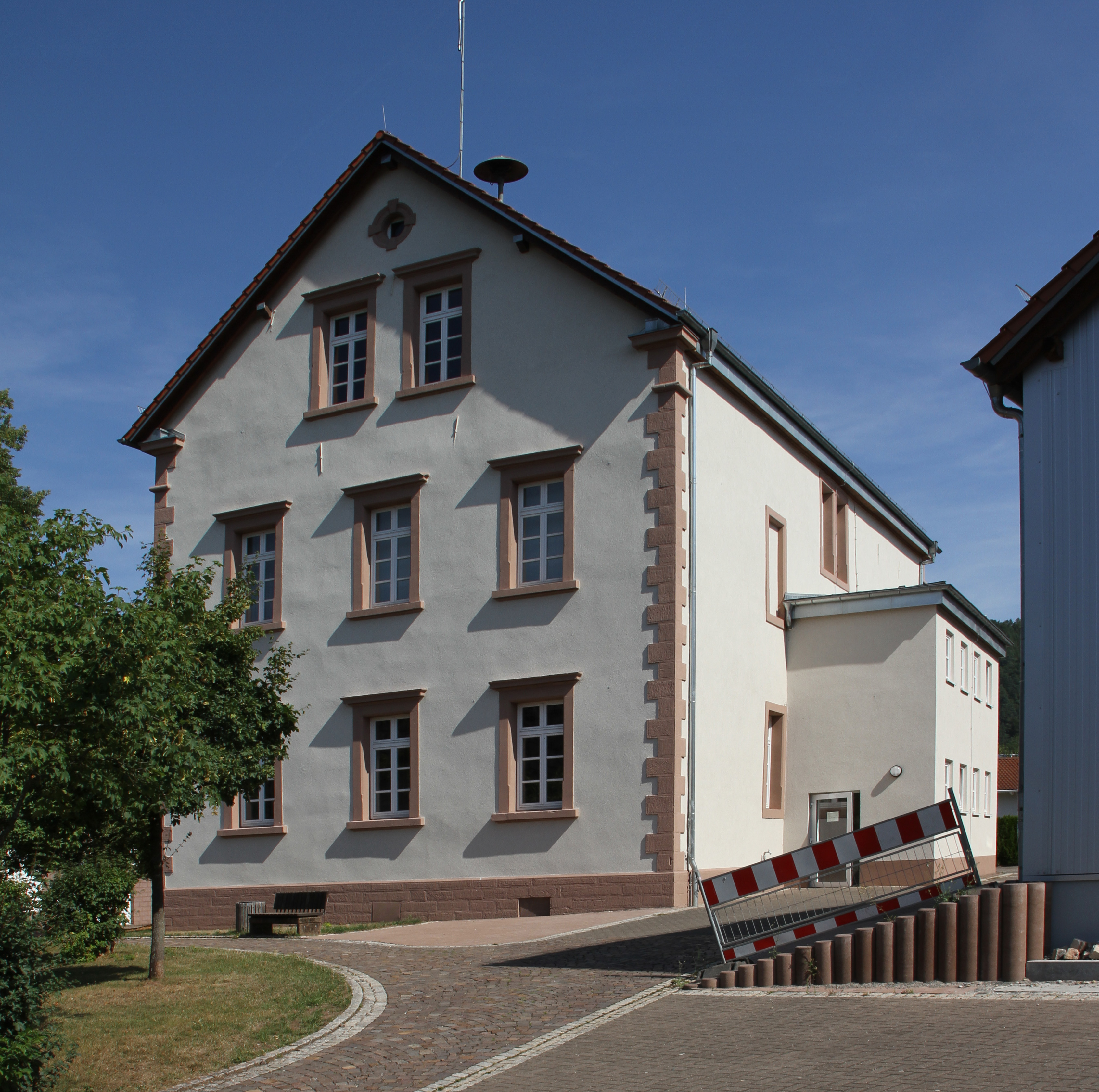 Münchweiler an der Rodalb, Schulstrasse 19, Rathaus; ehemalige Schule; spätklassizistischer Putzbau, wohl aus der zweiten Hälfte des 19. Jahrhunderts.